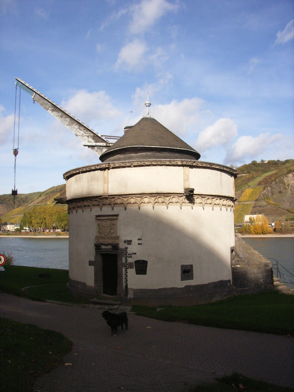 ... Alter Krahnen in Andernach Genehmigung: ...liegt vor